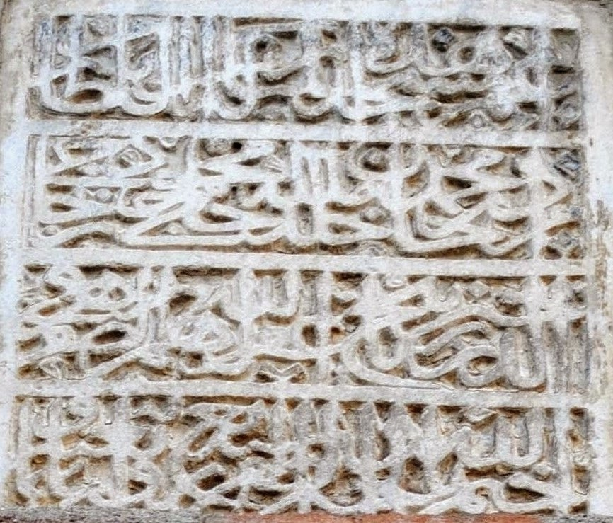 veledi yaniç vakfiye 1